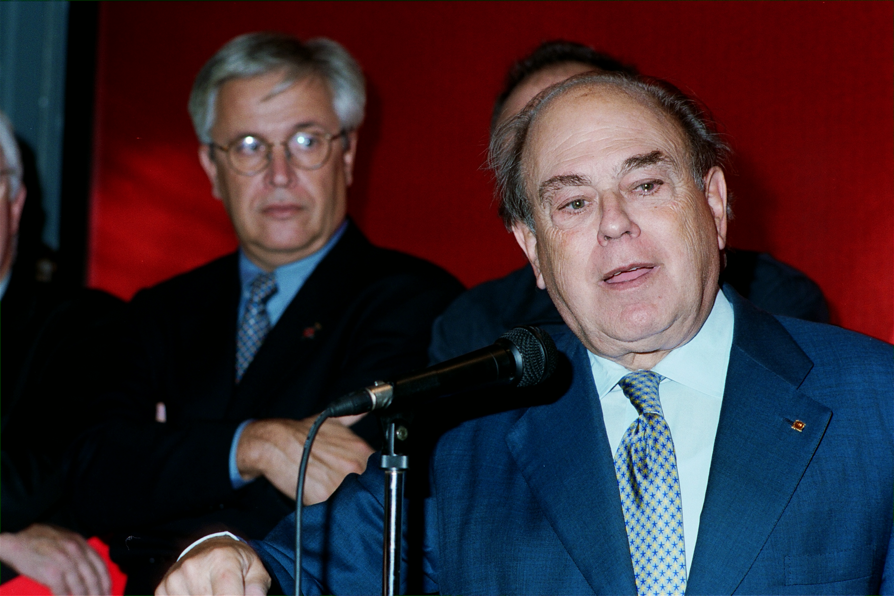 Jordi Pujol al MHC el 2001. Al fons Joan Clos.